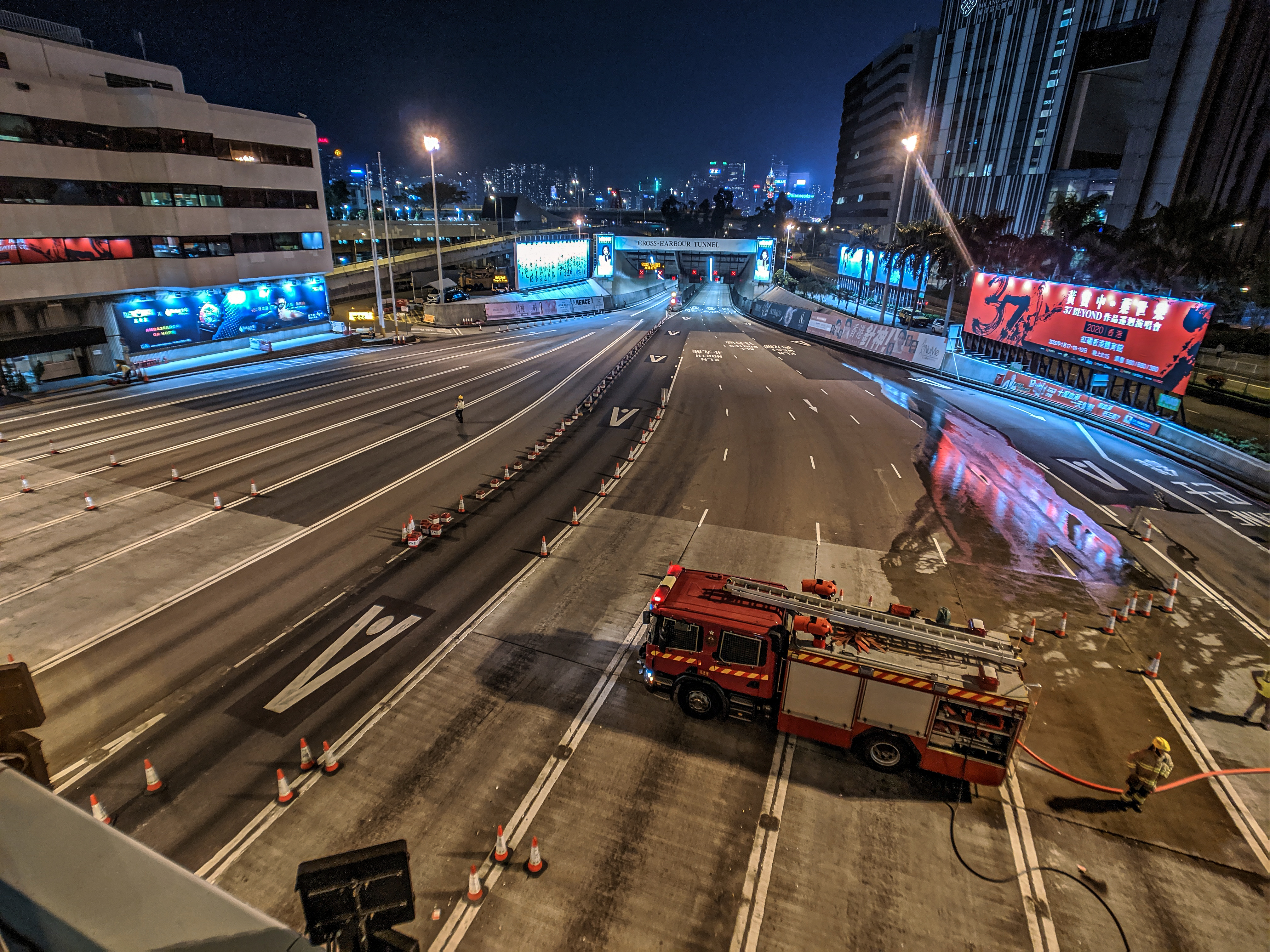 IMG_20191114_204442